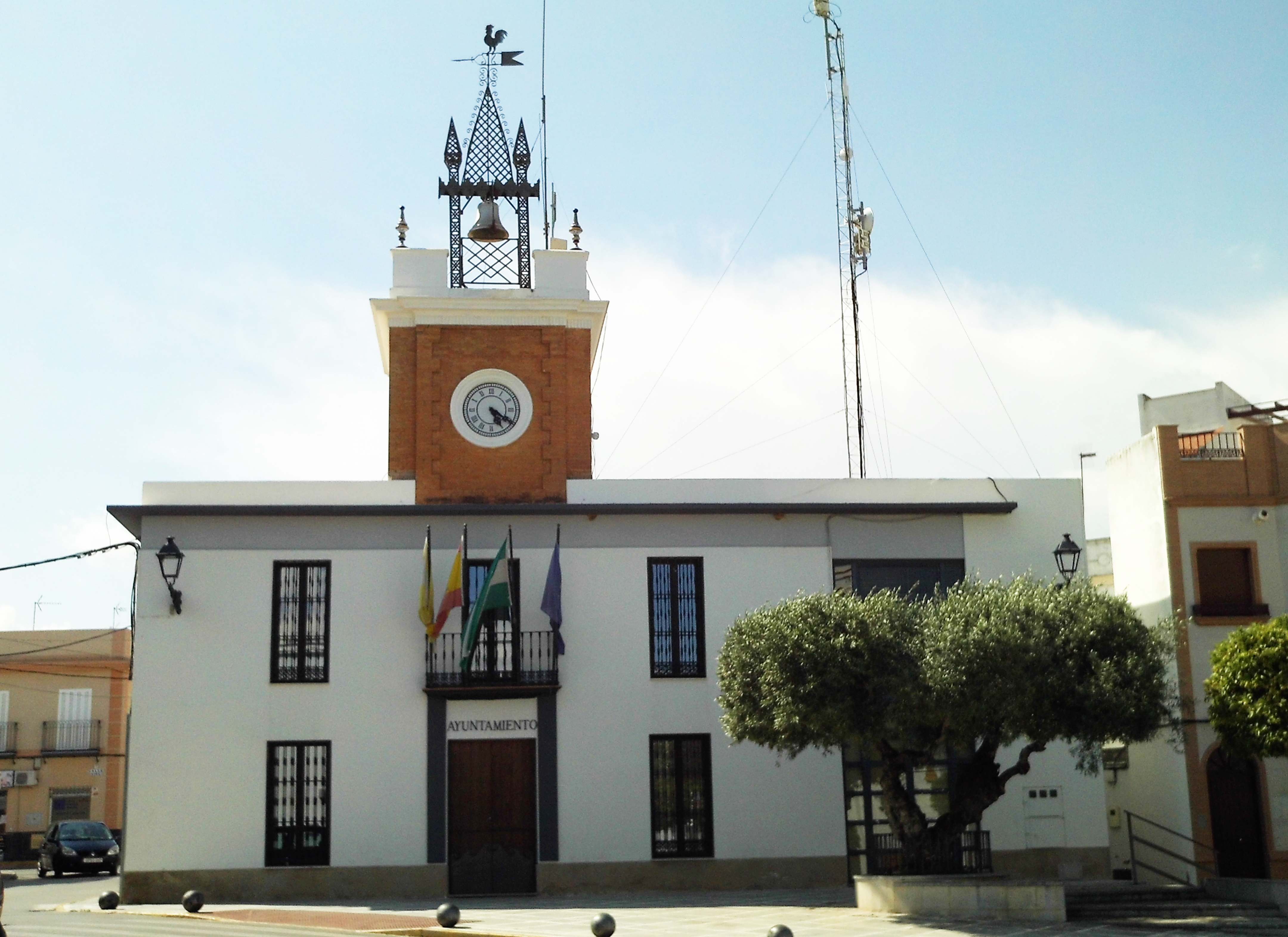 Ayuntamiento de Almensilla, provincia de Sevilla, Andalucía, España.